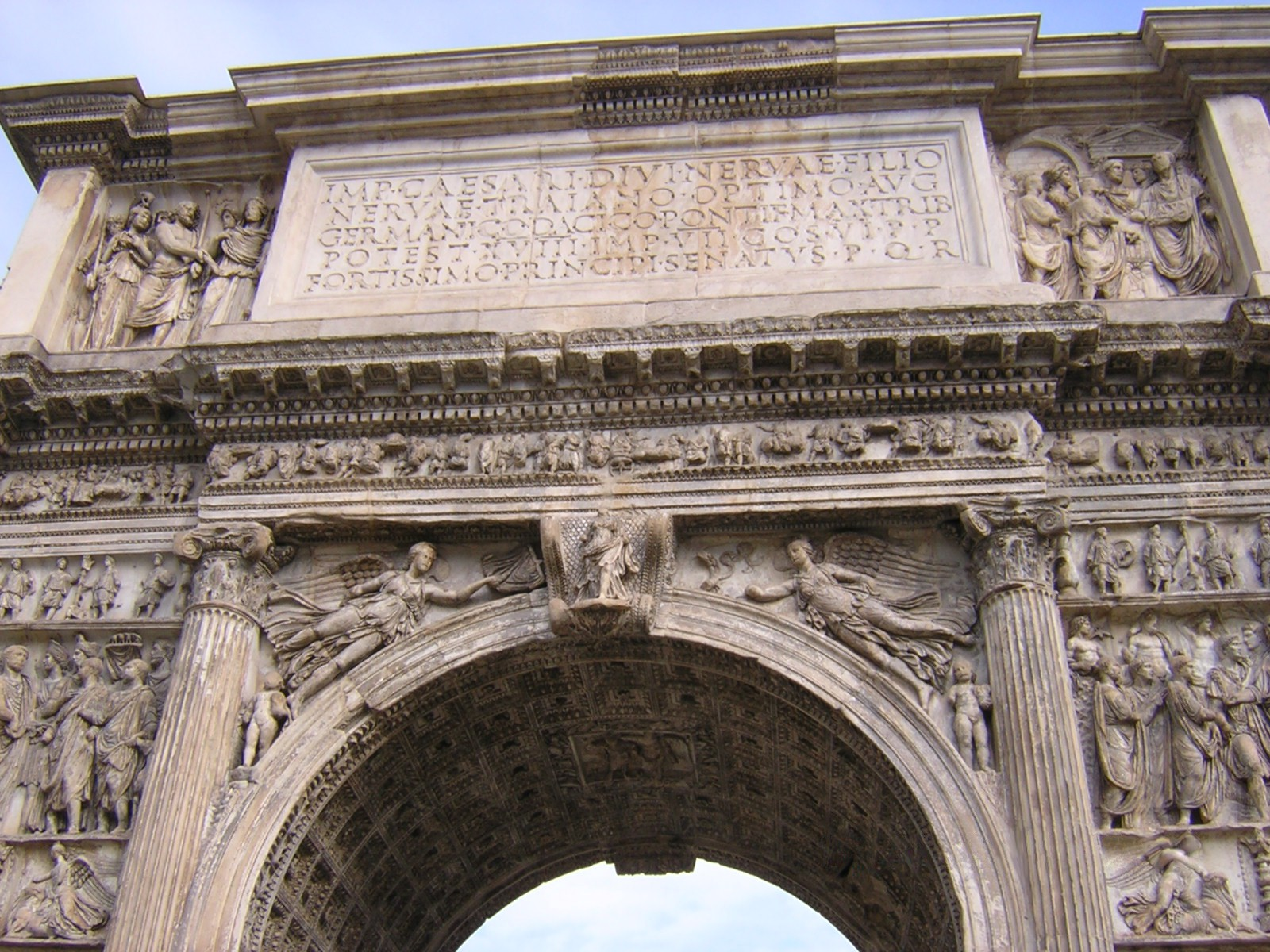 La foto è stata scattata con la mia macchinetta NIKON, nella data scritta sulla stessa. Ritrae la parte sommitale dello stupendo Arco di Traiano in Benevento. La rilascio nel pubblico dominio e è quindi ad uso e discrezione di tutti.